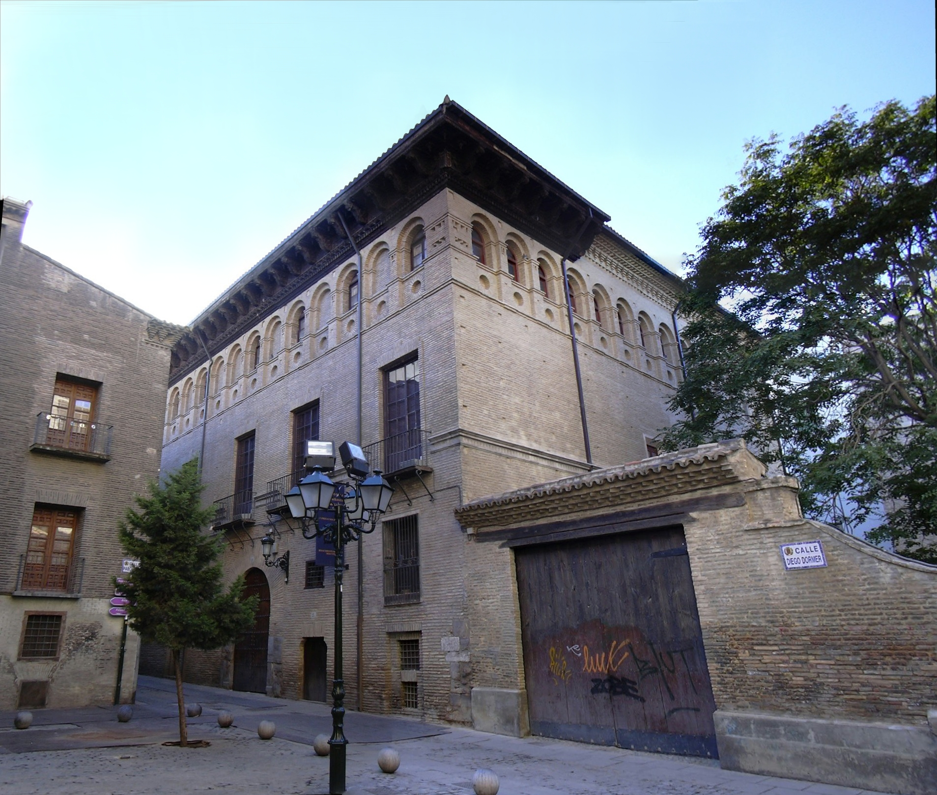 Zaragoza - Casa de Miguel Donlope